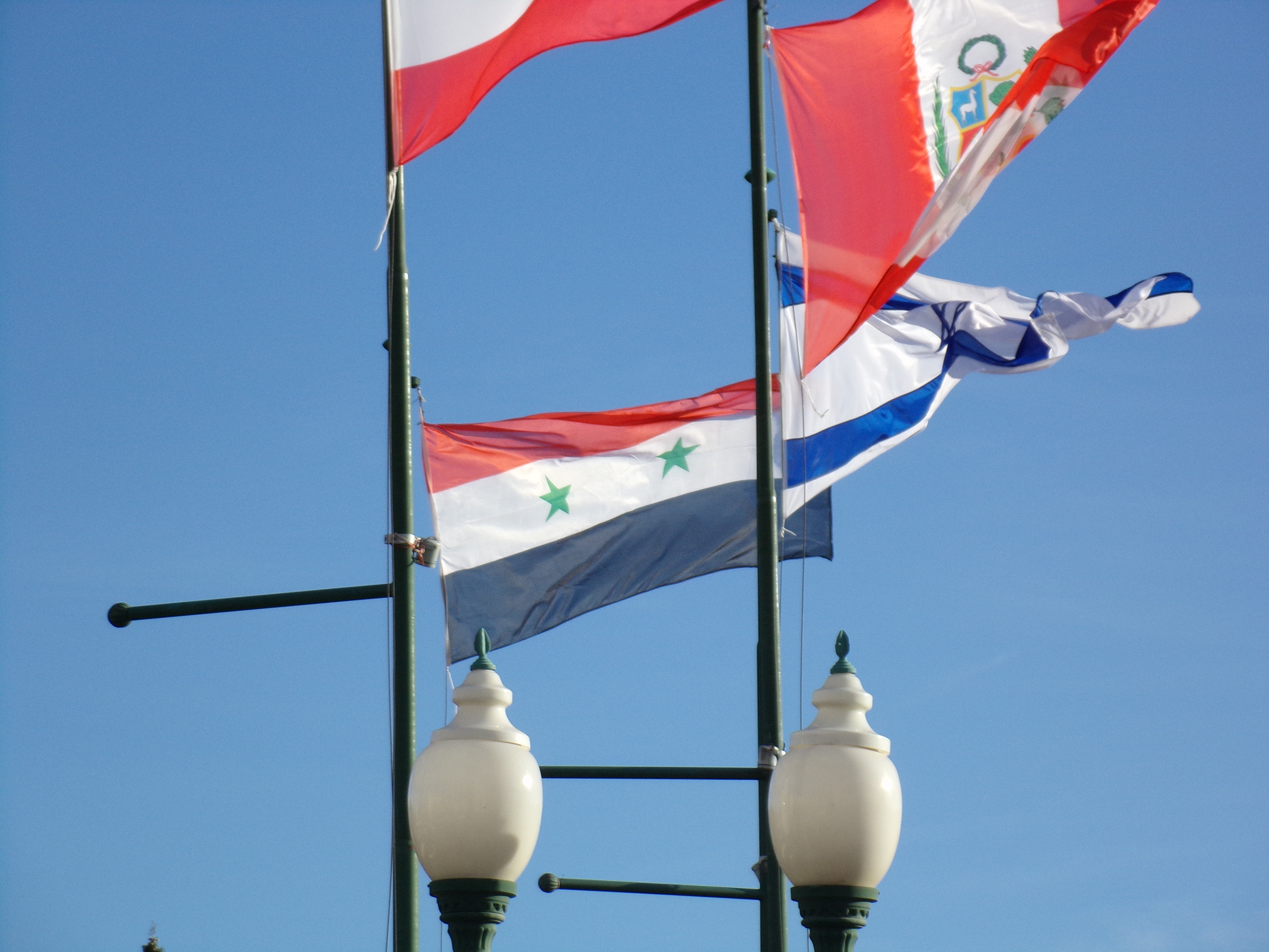 Bandera de Siria en la plaza de las Colectividades de Trelew, Argentina. También se aprecian las banderas de Israel y Perú